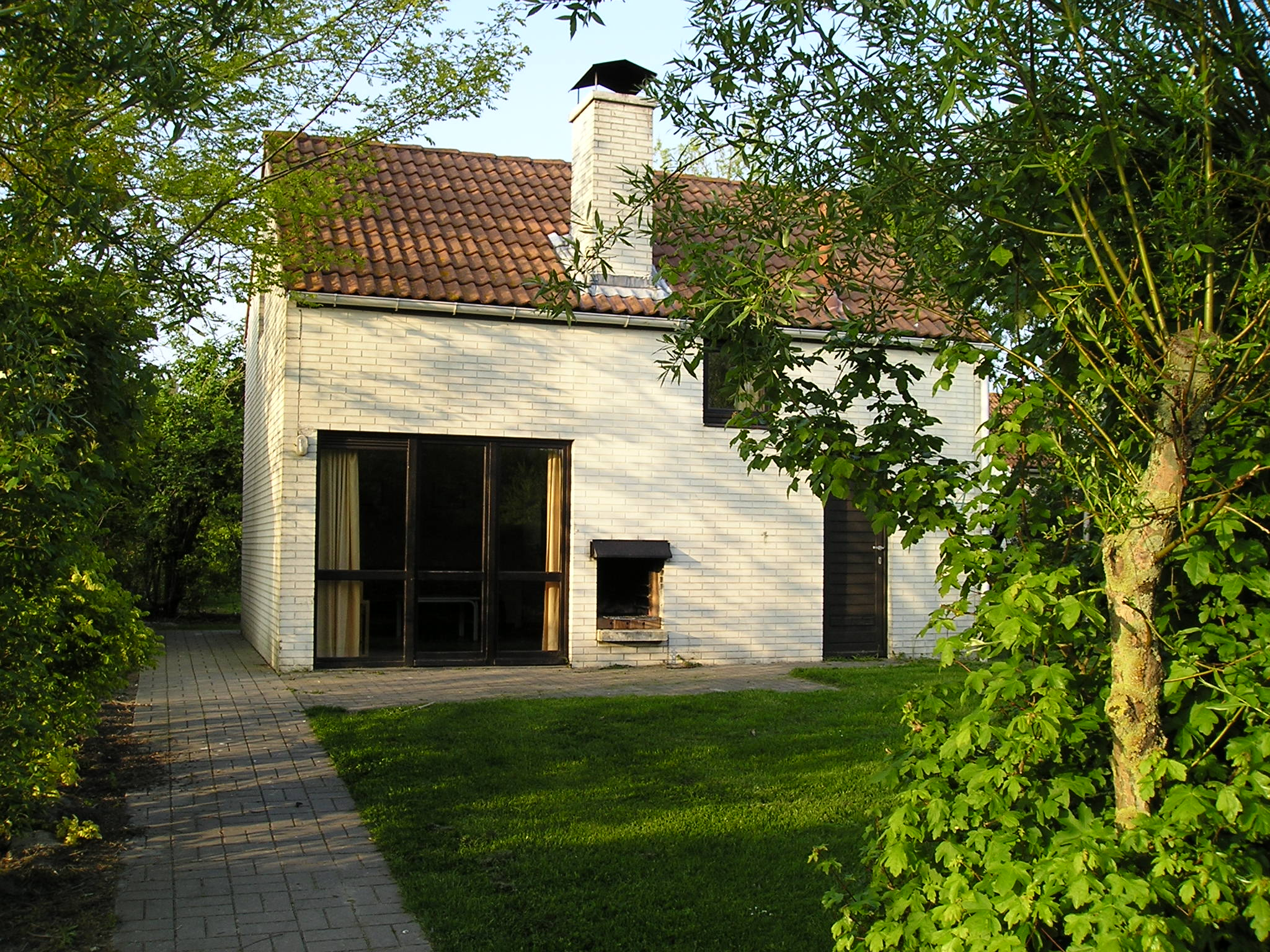 Ferienhaus in De Haan